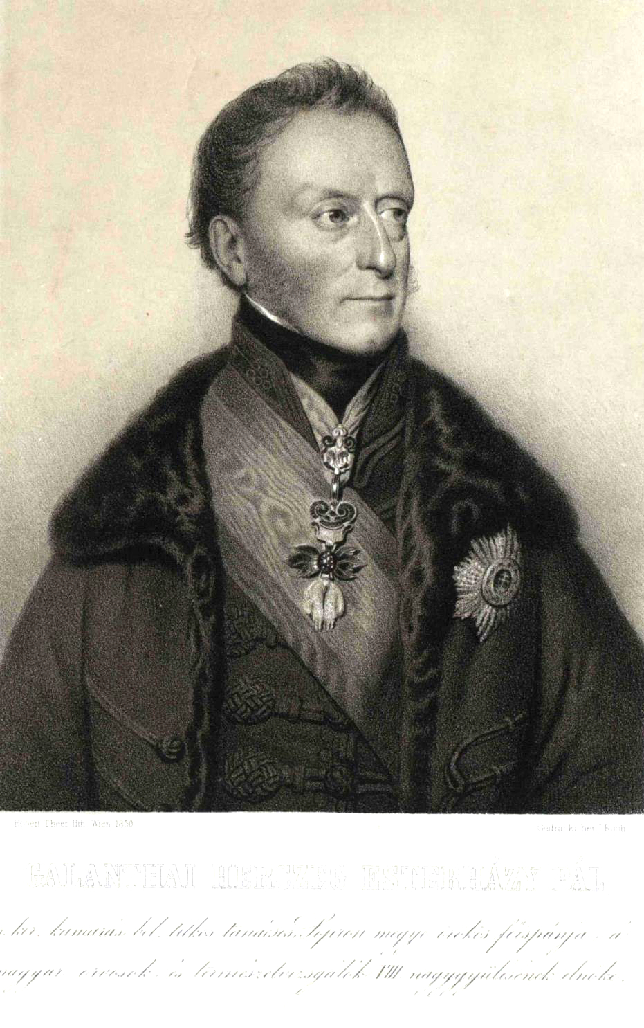 Galánthai herceg Esterházy Pál Antal (Bécs, 1786. március 11. – Regensburg, 1866. május 21.) diplomata, a király személye körüli miniszter, Sopron vármegye örökös főispánja.